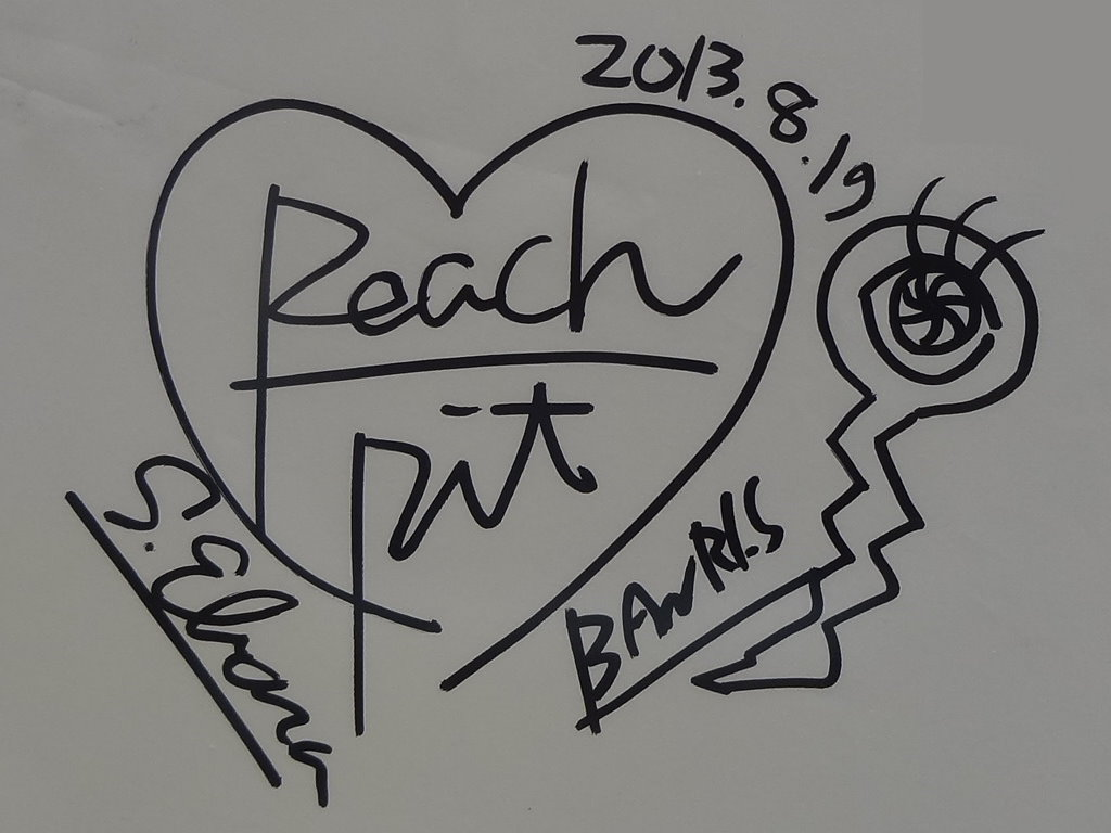 2013年（第14屆）漫畫博覽會的Peach-Pit簽名。